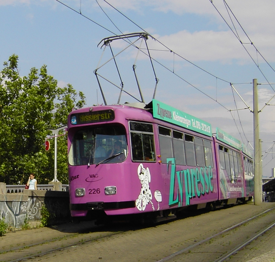 Beschreibung: Straßenbahn Typ GT8 der VAG Freiburg Quelle: selbst aufgenommen Fotograf: CrazyD, 11. Juli 2005 Lizenzstatus: GNU FDL Description: Tram Typ GT8 Source: photo was taken by my self Photographer: CrazyD, 11 July 2005 Licence: GNU FDL